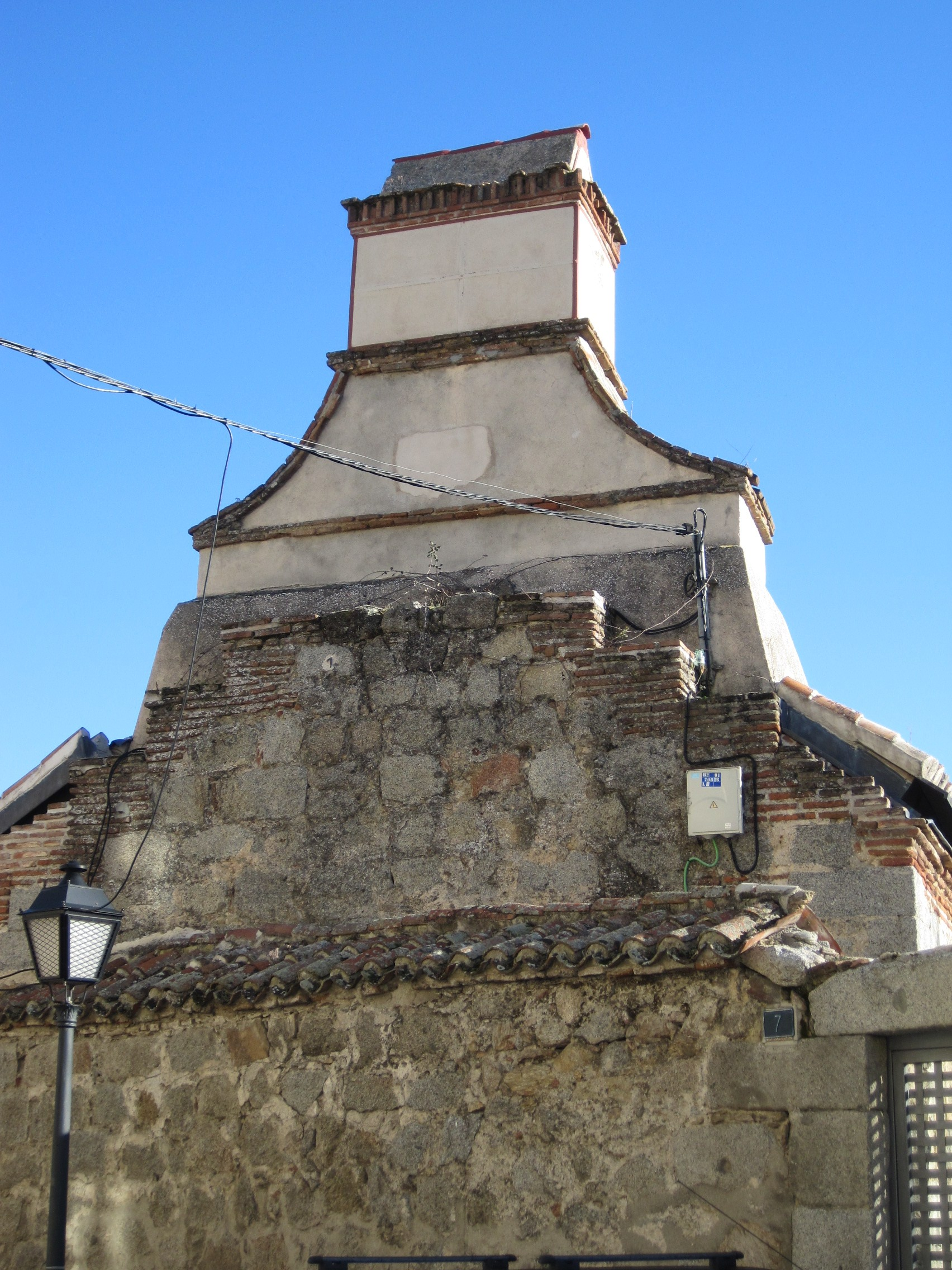 Chimenea del horno que formó parte del complejo del Monasterio de Prestado, en El Escorial (Madrid, España).